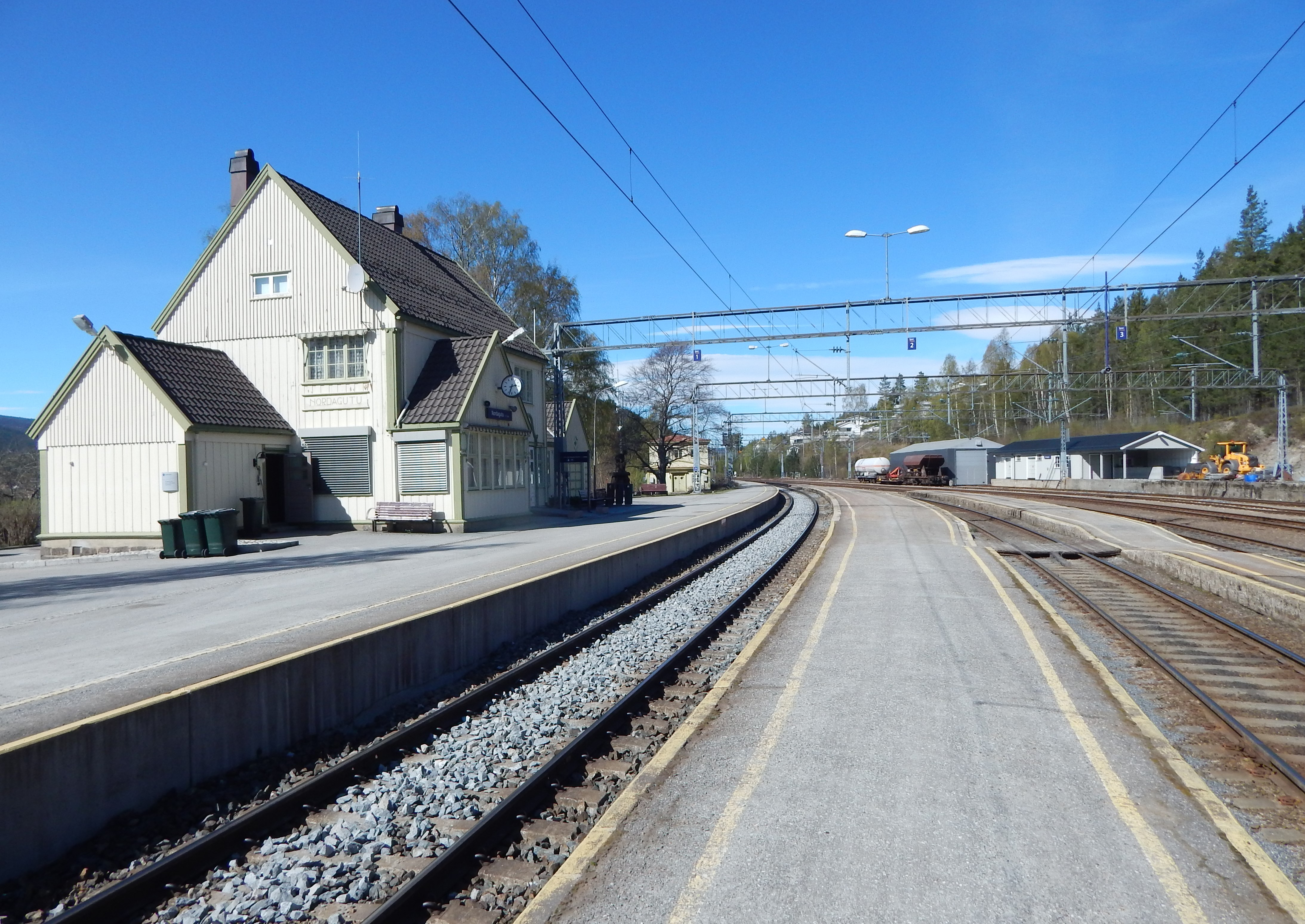 Nordagutu stasjon anno 2015